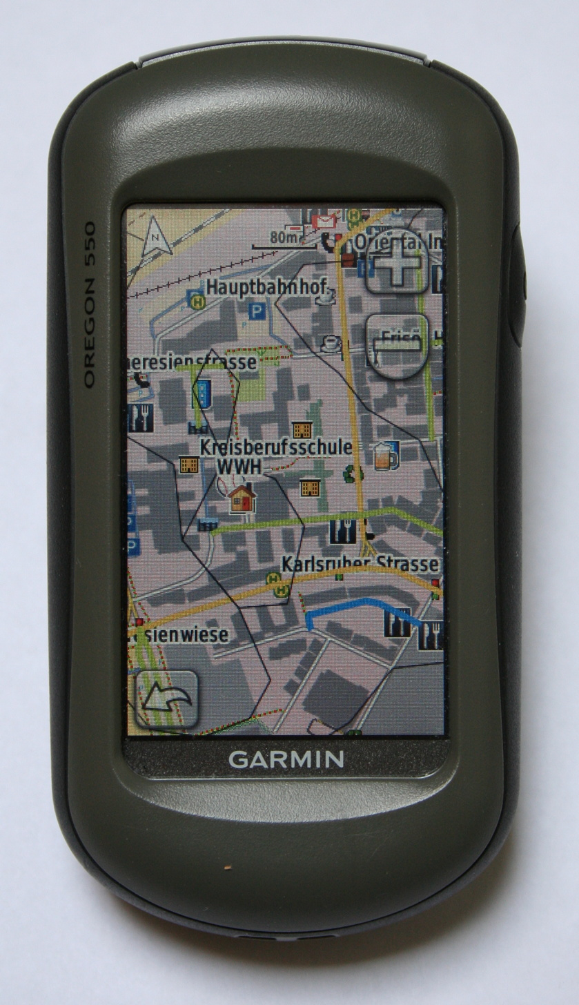 Garmin Oregon 550 mit OpenStreetMap-Karte Map of Karlsruhe. This map may be incomplete, and may contain errors. Don't rely solely on it for navigation.